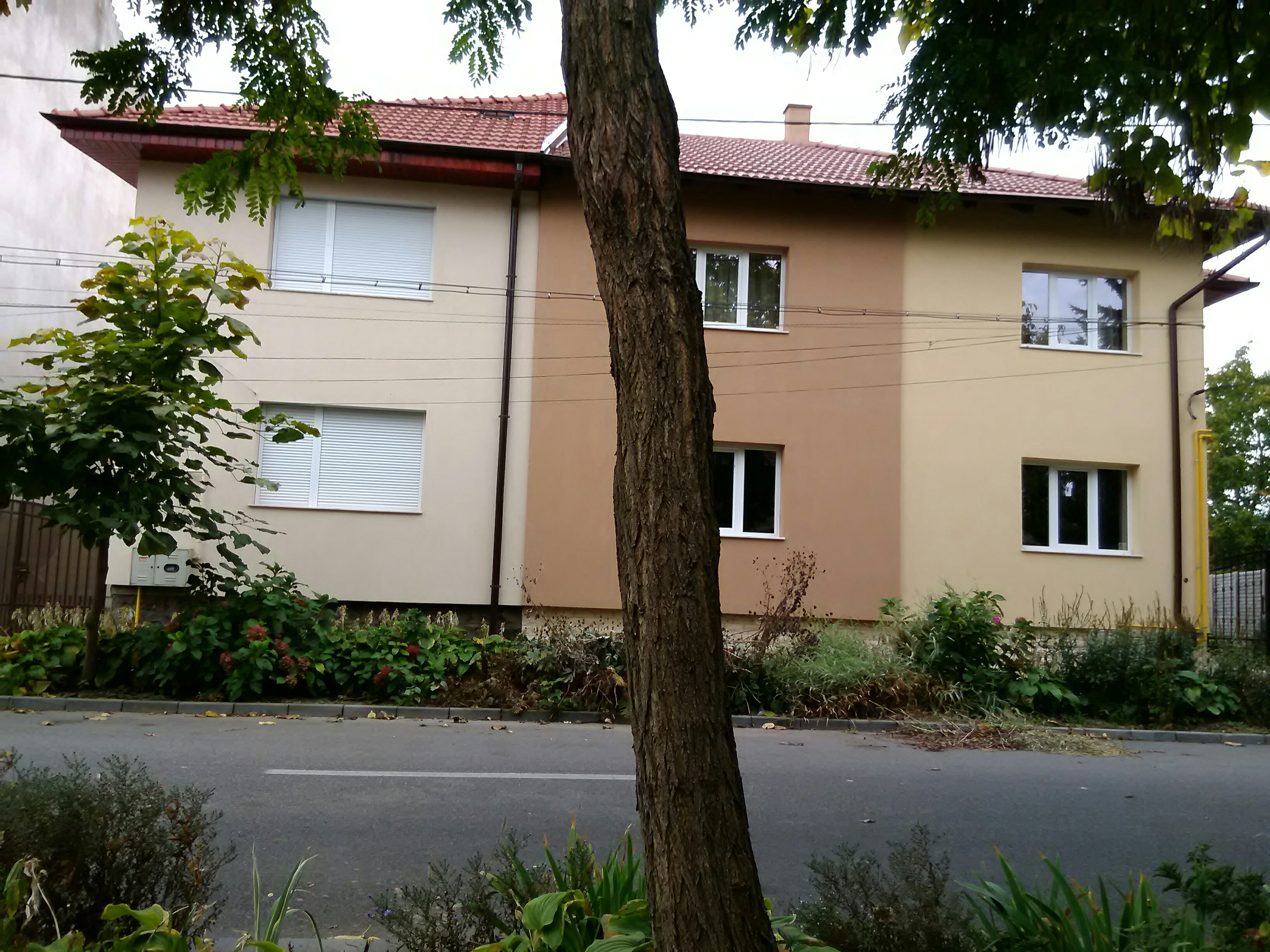 Ansamblul urban „Strada Paris”